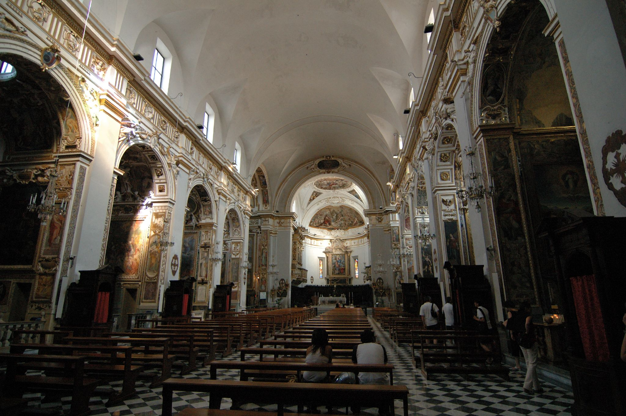 Navata centrale della cattedrale di Fabriano, dedicata a San Venanzio.